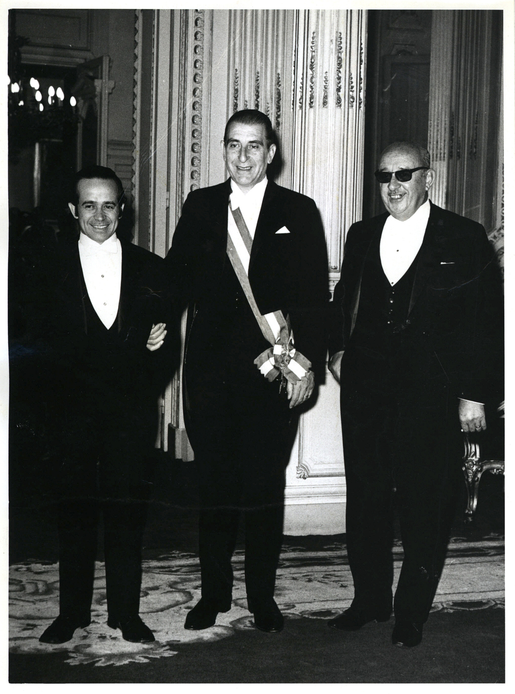 Eduardo Frei Montalva junto a Andrés Zaldívar. 1968. Eduardo Frei de traje de gala y banda presidencial junto a sus ministros Andrés Zaldívar y, probablemente, Eduardo León Villareal.